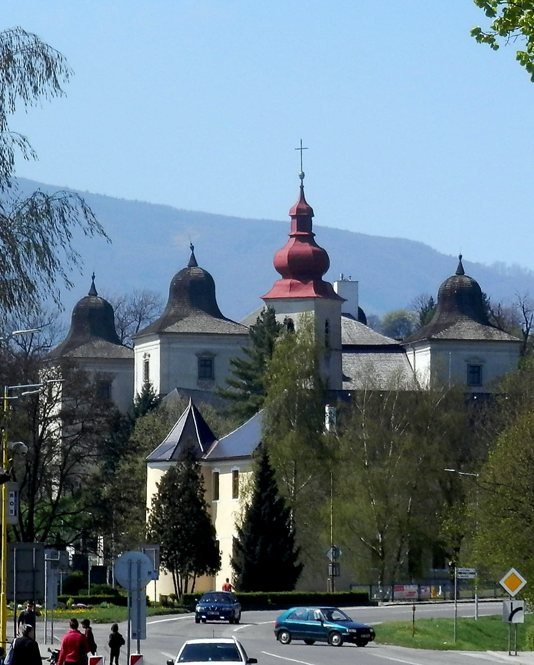 Barokový Dežöfiovský kaštieľ. Doba vzniku 1.polovica 18.storočia. V súčasnej dobe v kaštieli sídli Vlastivedné múzeum. Hanušovce nad Topľou.